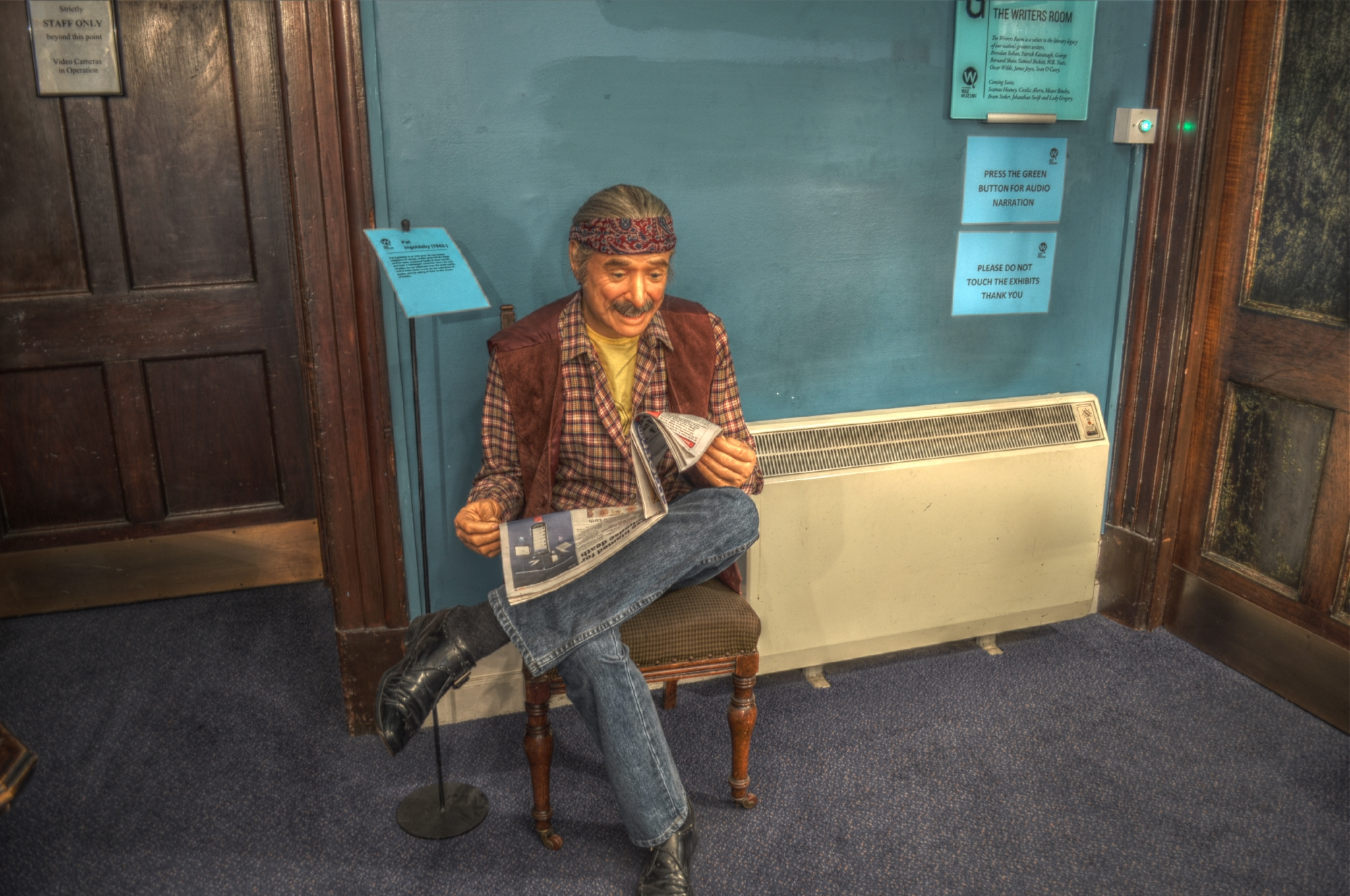 Camera: Nikon D5000 Luminance HDR, Mantiuk '06